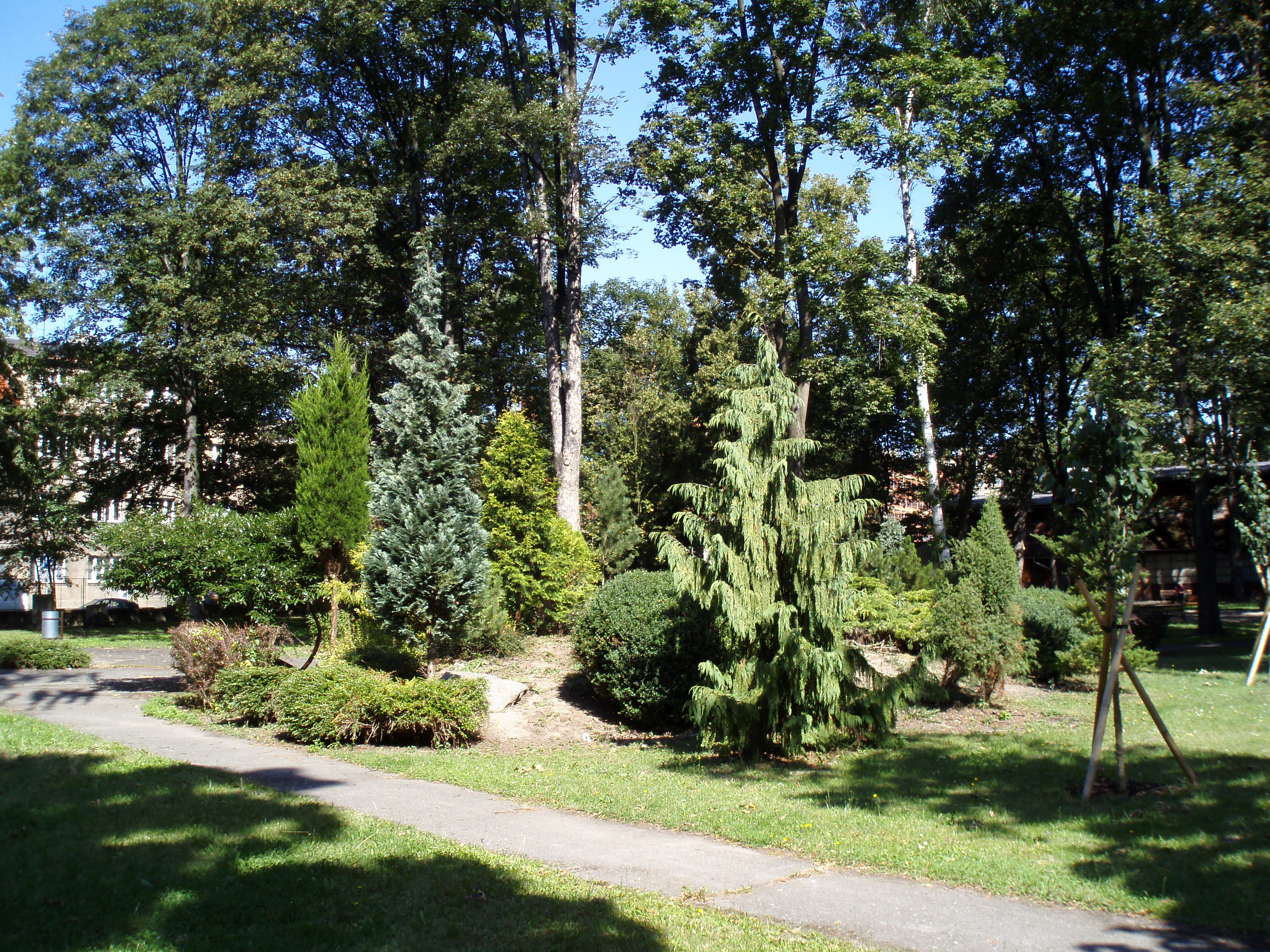 Zahrada KD Střelnice (Hradec Králové)